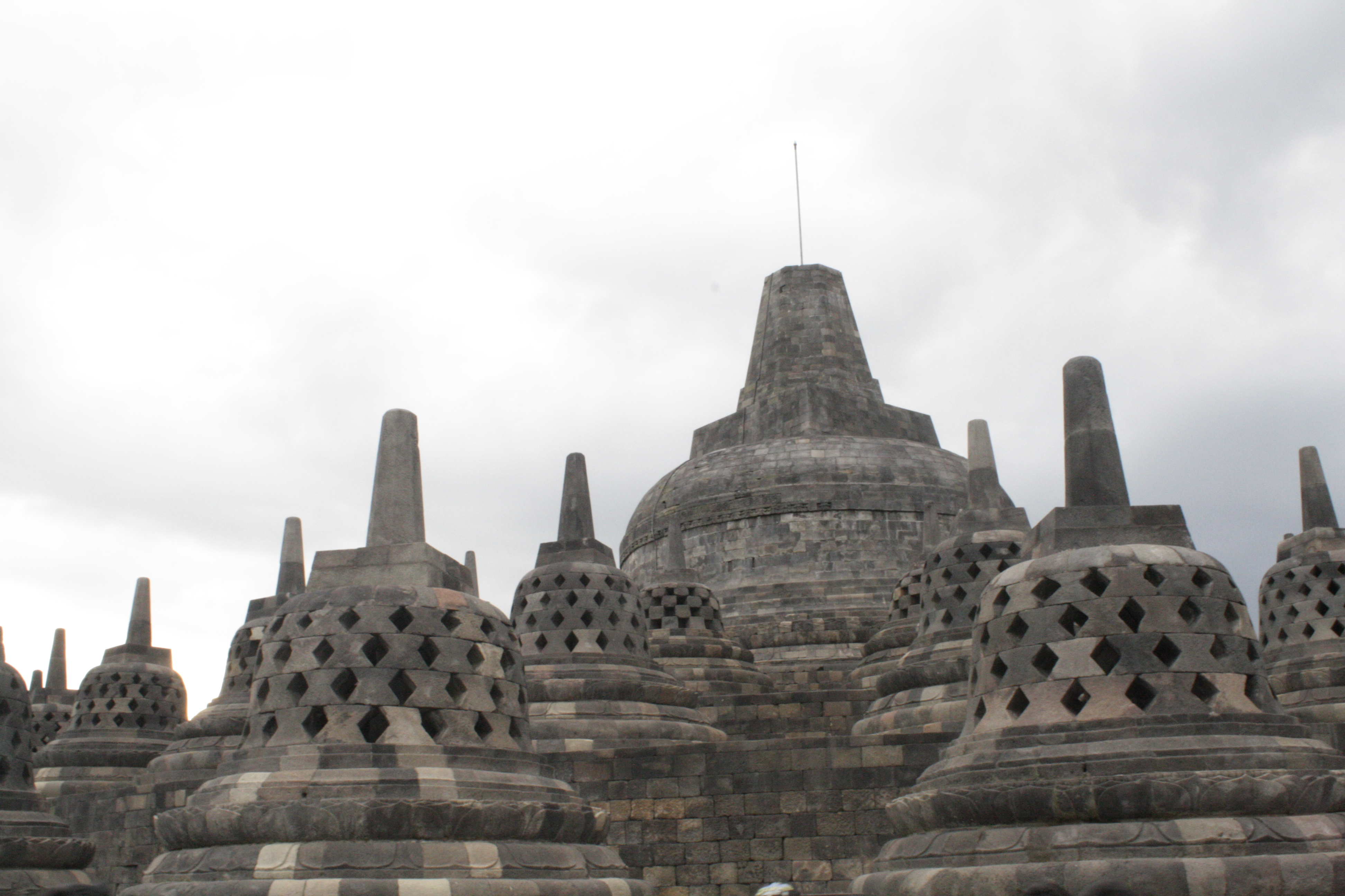 Stupa candi Borobudur